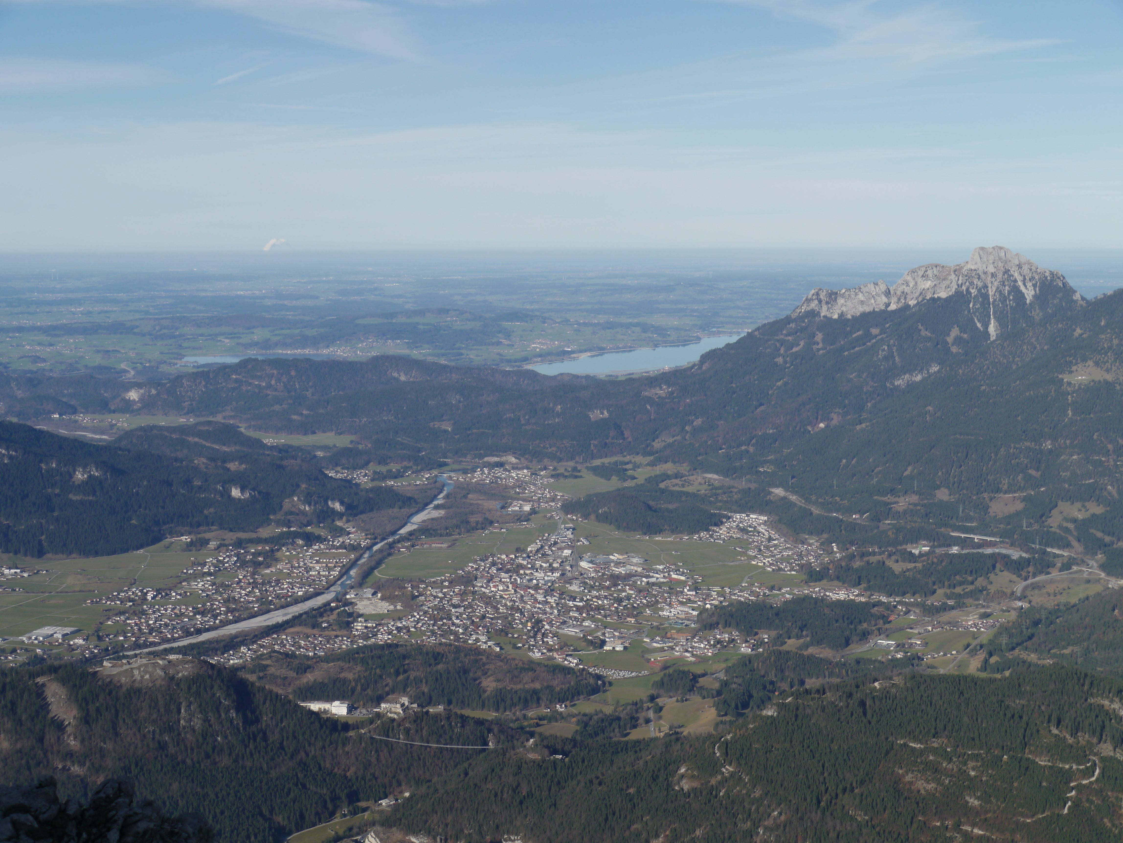 Blick vom Thaneller auf Reutte in Tirol mit Säuling.